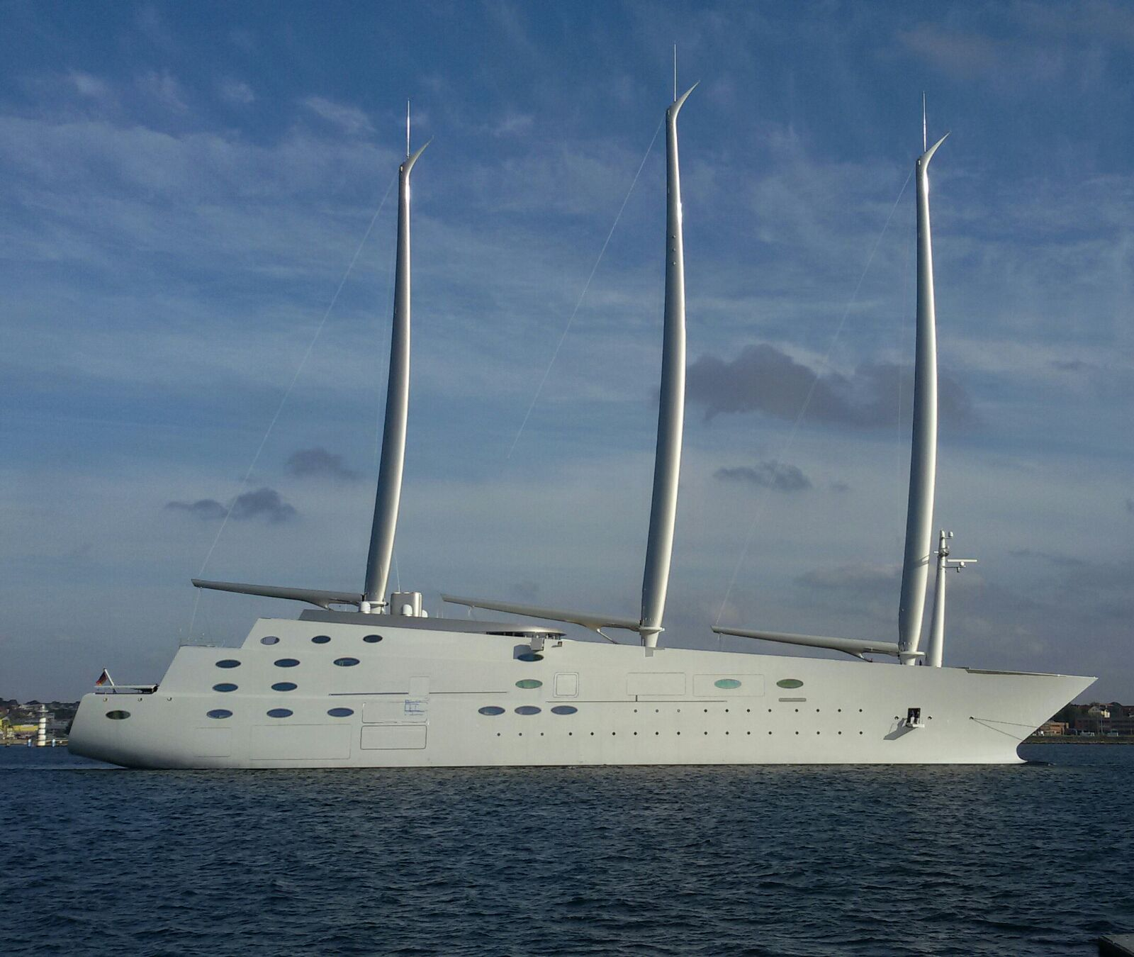 Sailing Yacht A in der Kieler Förde